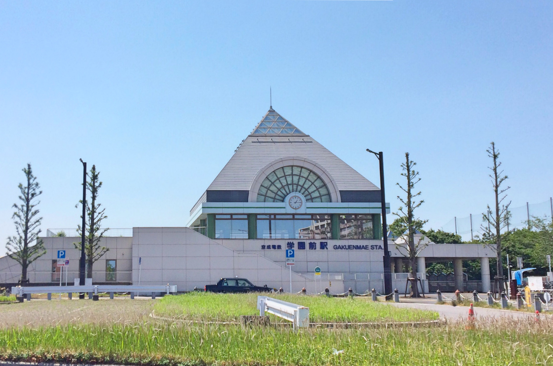 学園前駅舎